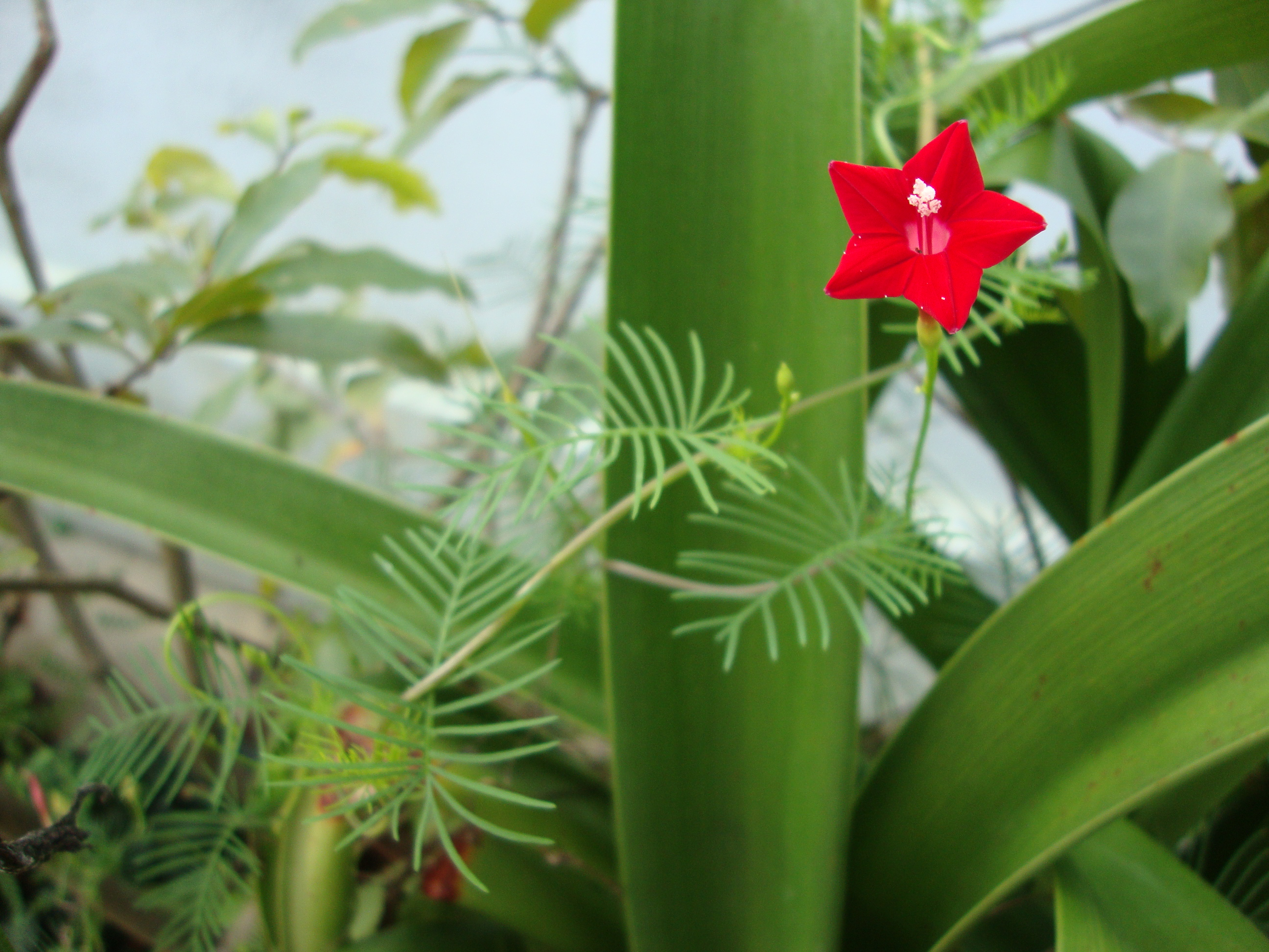 Ipomoea quamoclit L., 1753